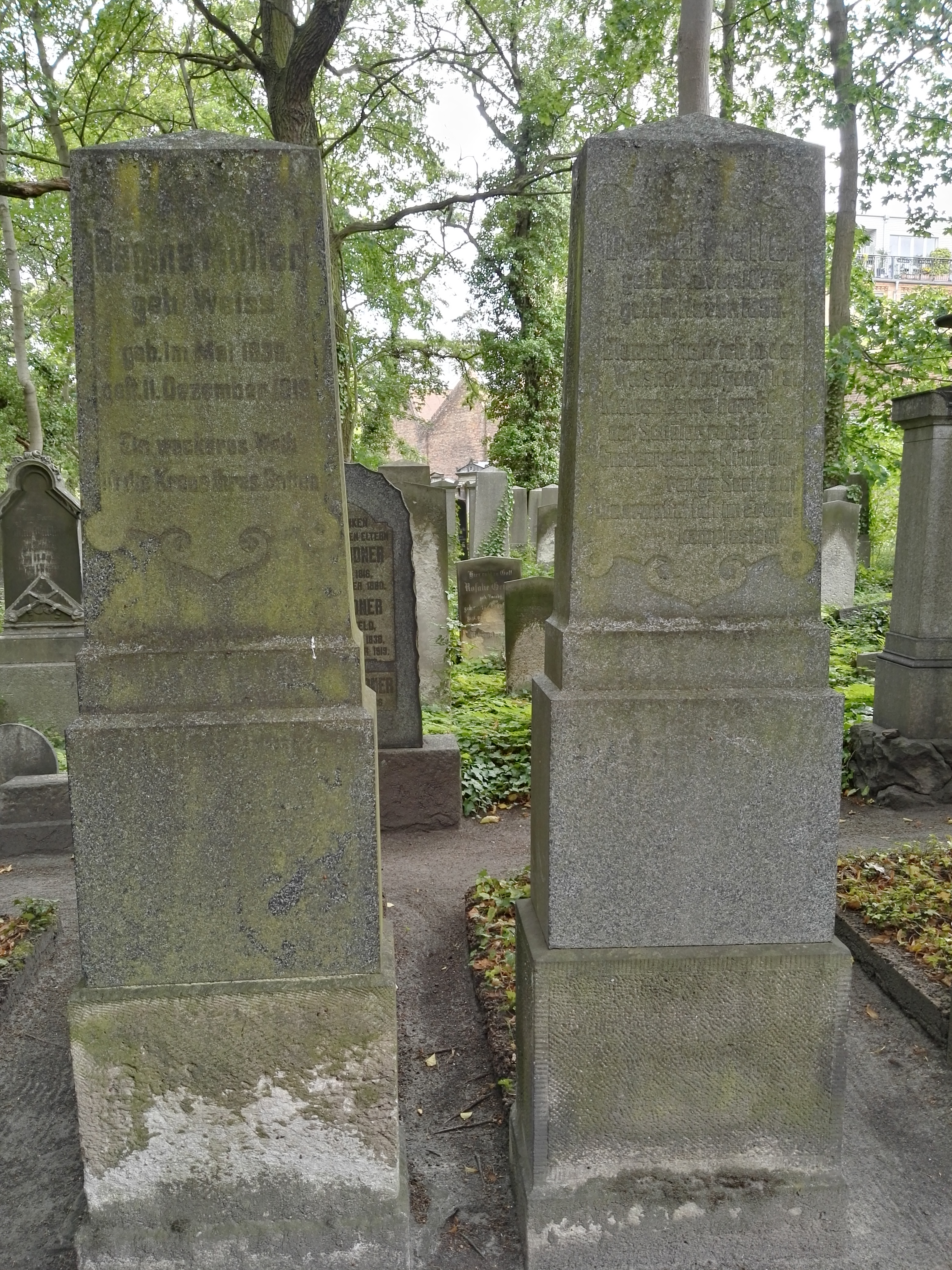 Grab von Joel Müller auf dem denkmalgeschützten Jüdischen Friedhof Berlin-Weißensee